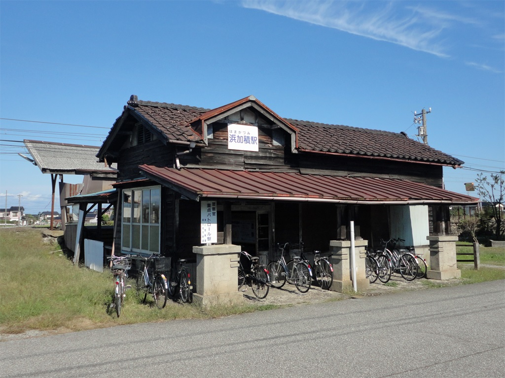 富山地方鉄道本線浜加積駅駅舎